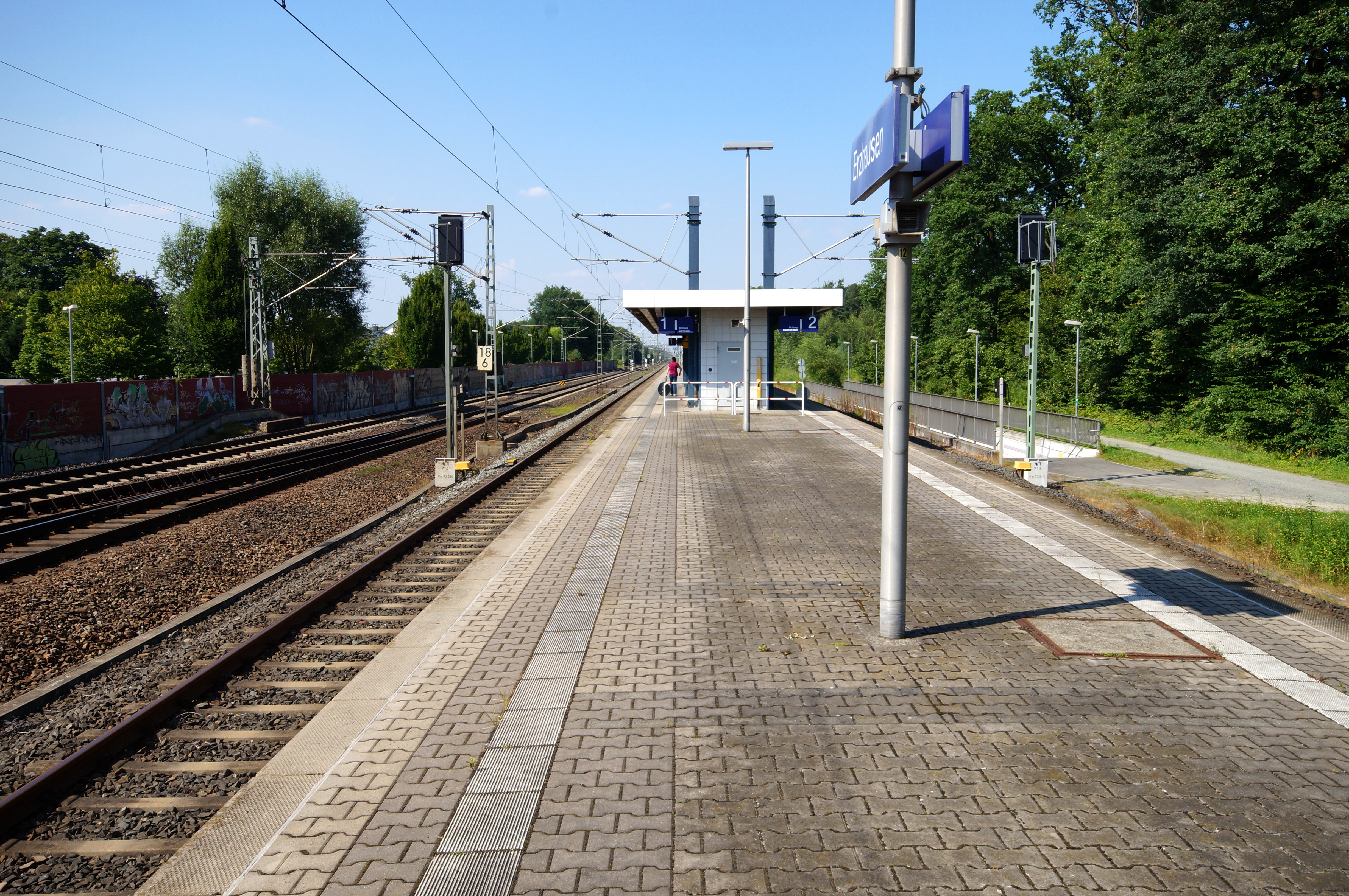 Die Bahnsteige des Erzhausener Bahnhofs. Am Erzhausener Bahnhof halten S-Bahnen der Linie S 3 der S-Bahn Rhein-Main.